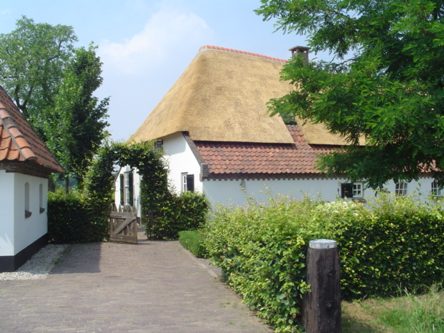 Brabantse langgevelboerderij